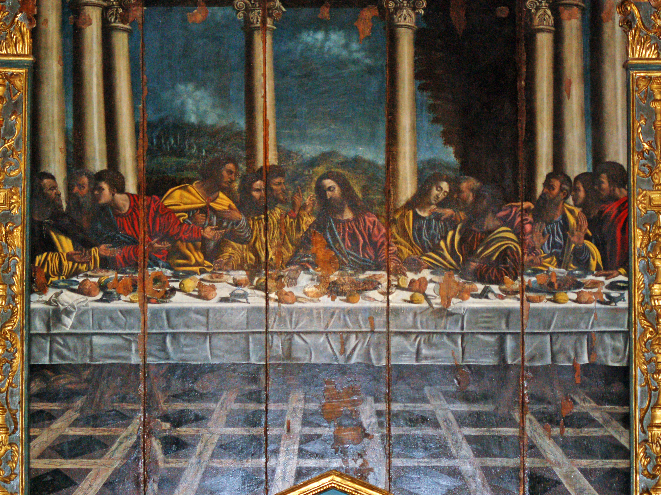 Pala d'altare in legno "Ultima Cena" di Alessandro Berri 1540 presso la chiesa dei SS. Pietro e Paolo a Castelnuovo Scrivia